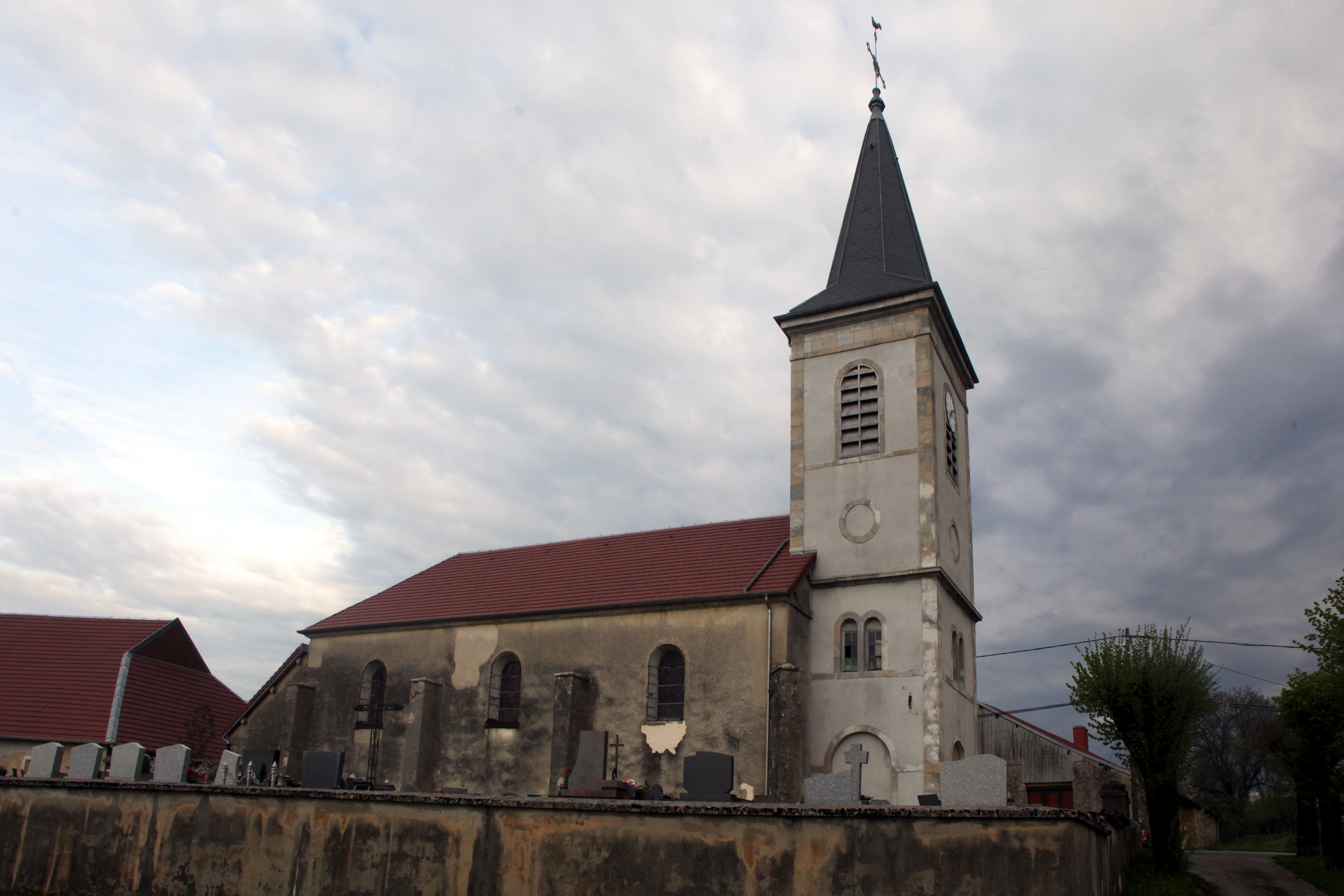 Église de Montmahoux (Doubs).